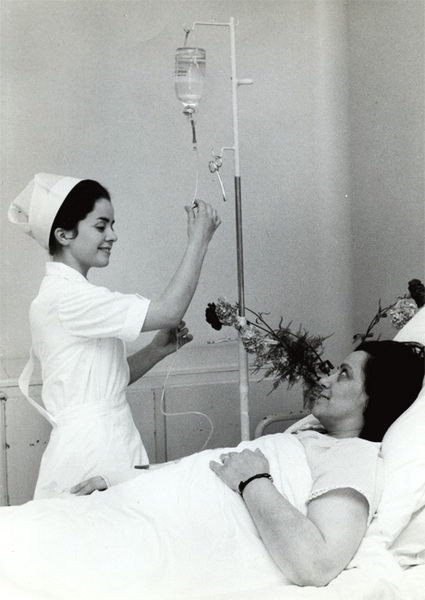 infirmiere